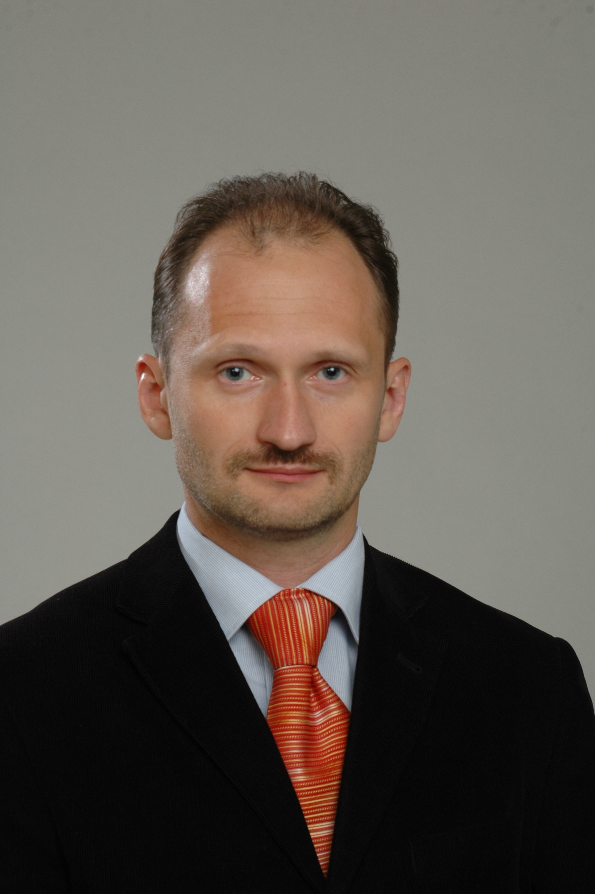 Foto: Saeima